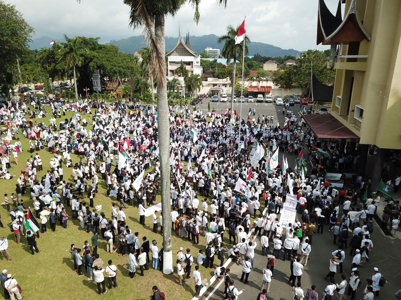 Solidaritas Umat Muslim Sumbar dalam Aksi Bela Palestina Mei 2018